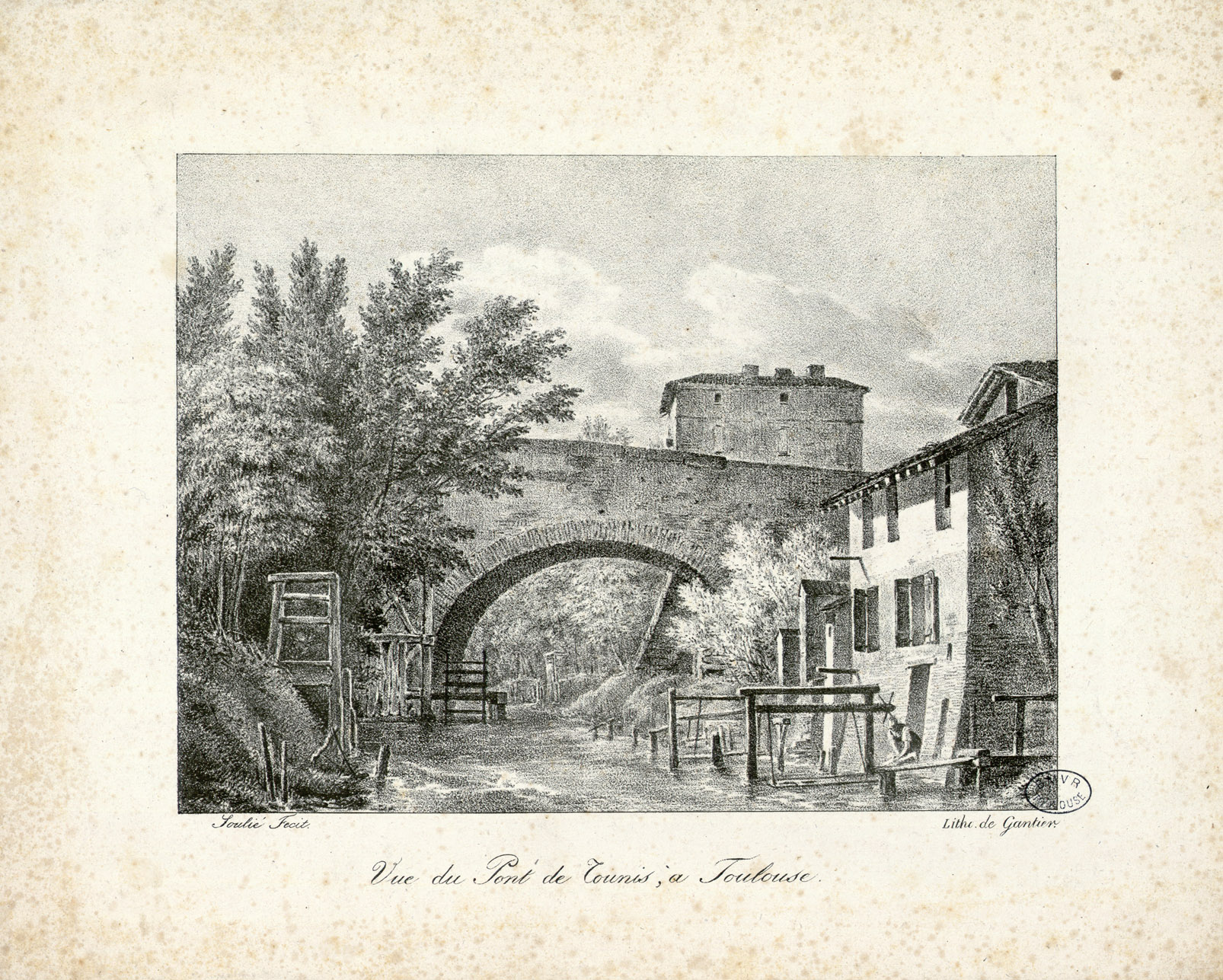 Fait partie d'un recueil de 4 lithographies dont 1 en couleurs représentant des scènes populaires Ancely, René (1876 - 1966). Possesseur